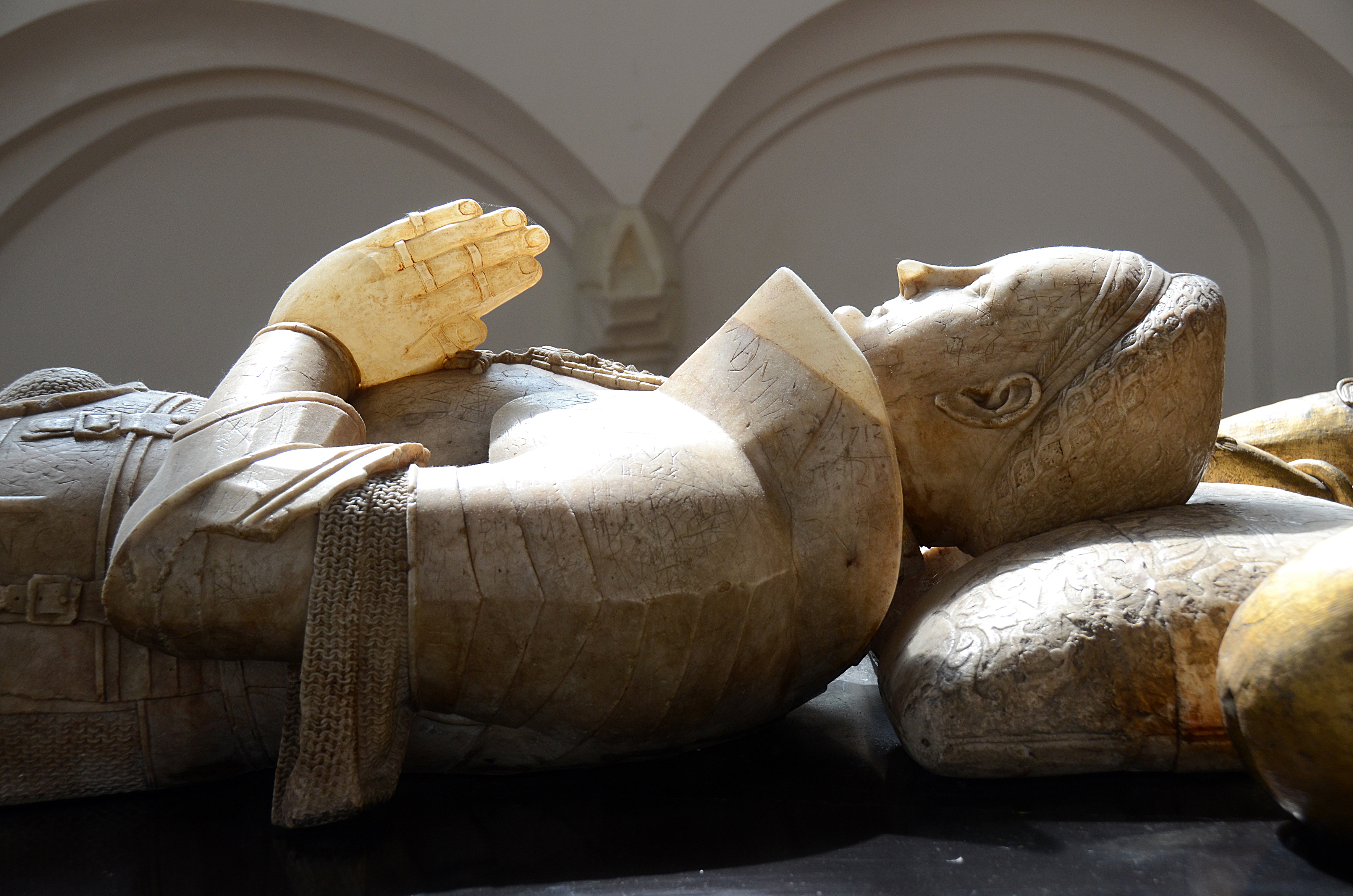 Graf van Karel van Egmond in de Eusebiuskerk te Arnhem